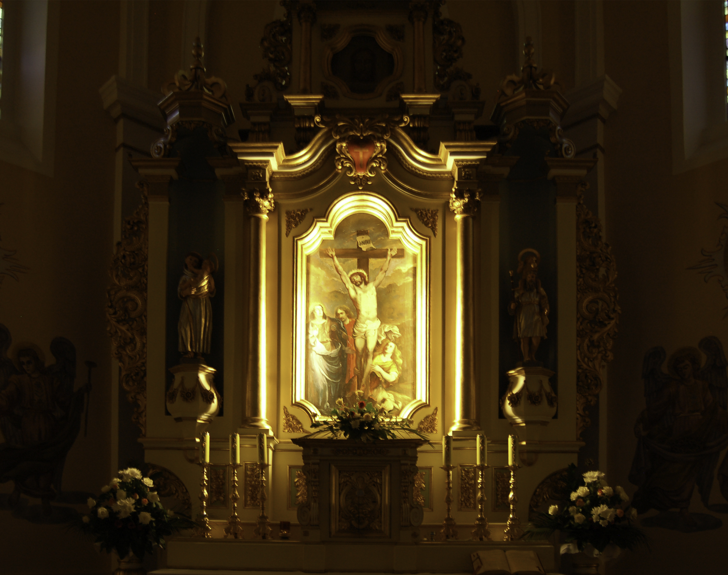 Oświetlony ołtarz główny w kościele św. Krzyża w Rumi